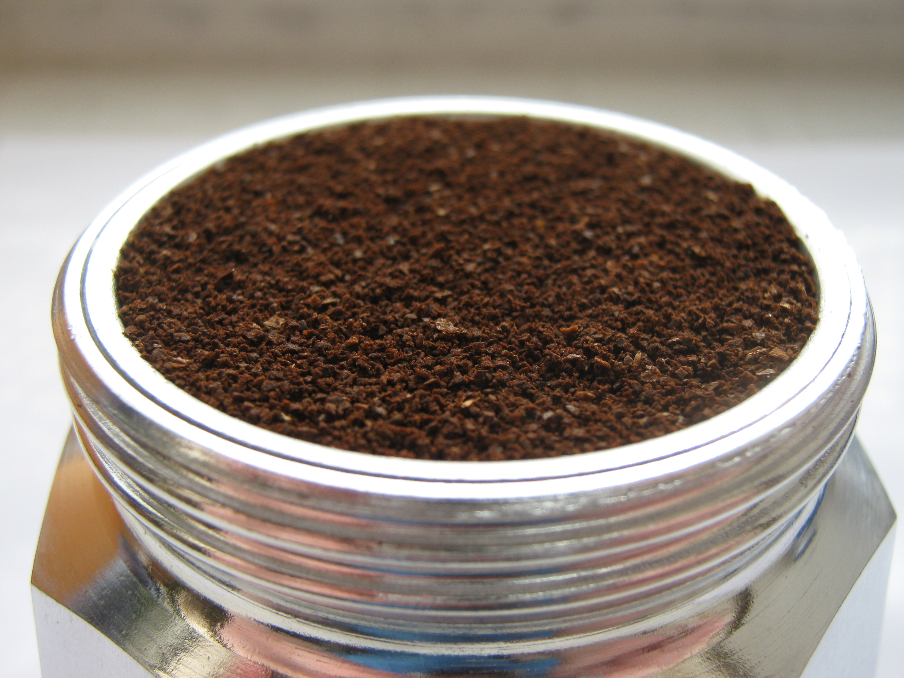 Правильно наполненная воронка гейзерной кофеварки.